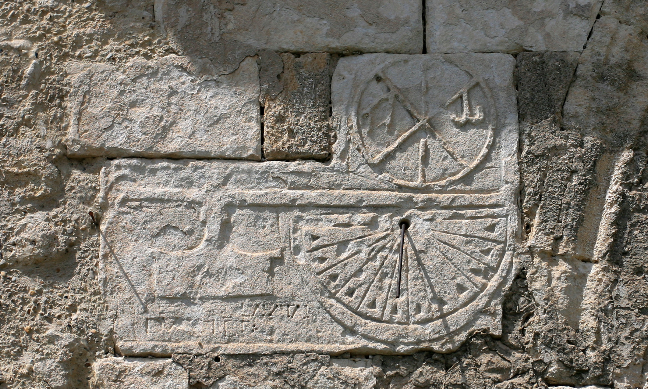 Détail sur la chapelle des Vignères (commune de Cavaillon, Vaucluse)